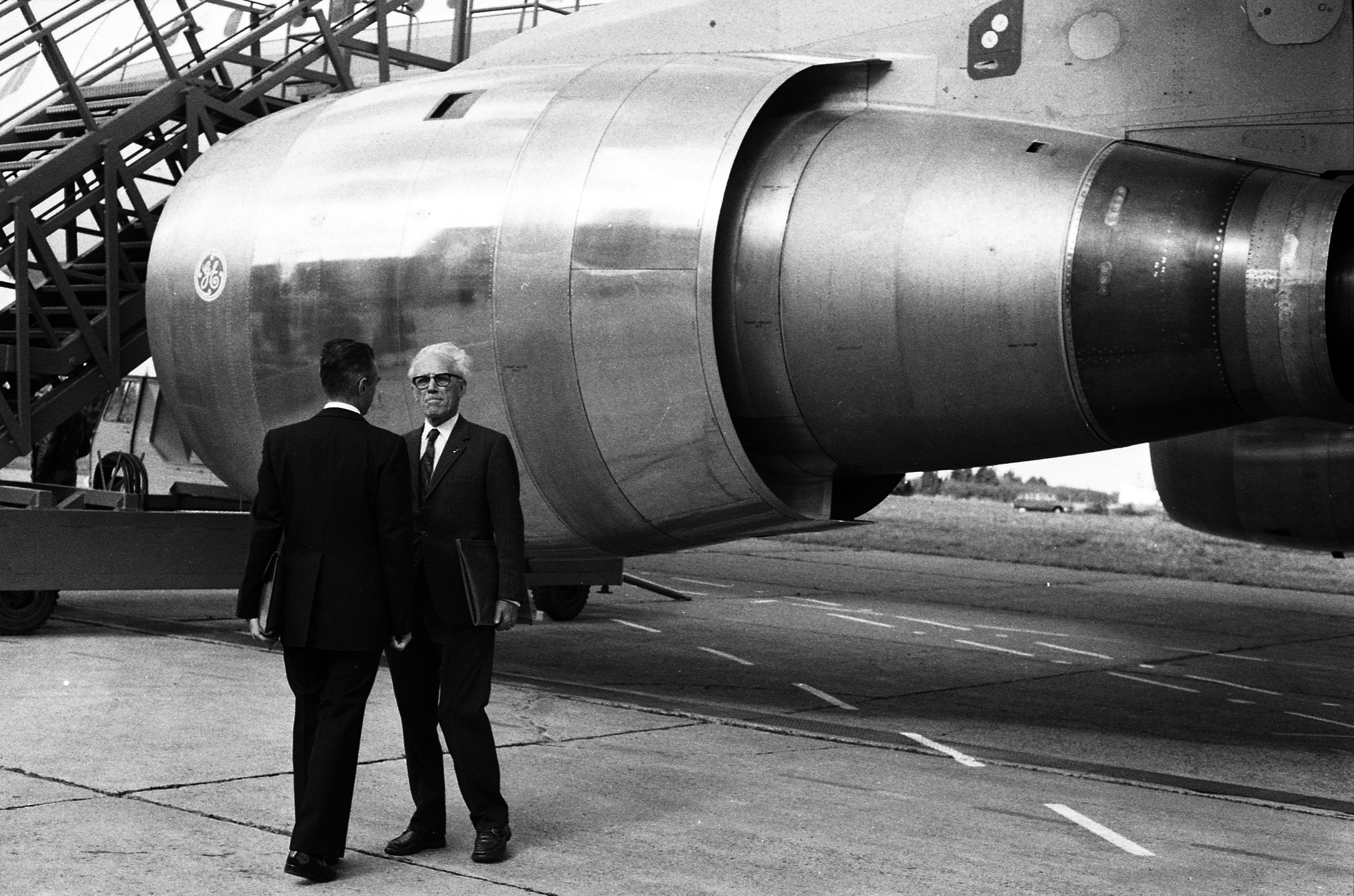 Pistes de Blagnac. 28 octobre 1972. Vue d'ensemble de face d'Henri Ziegler (Président de la Société Nationale et Industrielle de l'Aérospatiale) discutant avec Roger Béteille (Directeur du programme Airbus) de dos au pied de l'avion ; en arrière-plan réacteur de l'avion. Cliché pris lors du 1er vol d'essai de l'avion Airbus A300 B.